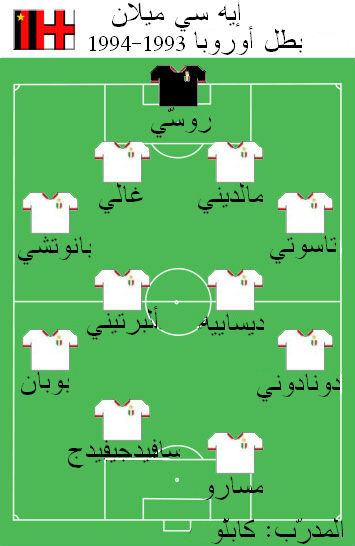 Formazione dell'AC Milan, AC Milan vs. FC Barcelona 4-0, 18 maggio 1994